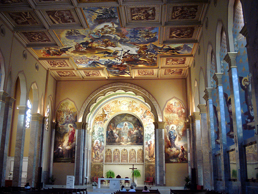 Interior da Igreja São Pelegrino, Caxias do Sul, Brasil. Pinturas murais de Aldo Locatelli